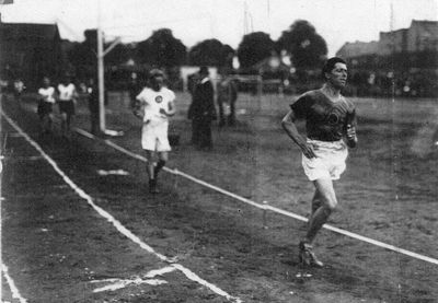 Il marciatore italiano Donato Pavesi in una foto d'epoca.